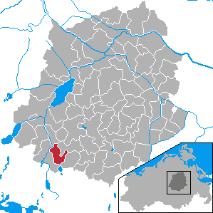 Zettemin, Landkreis Demmin, Mecklenburg-Vorpommern